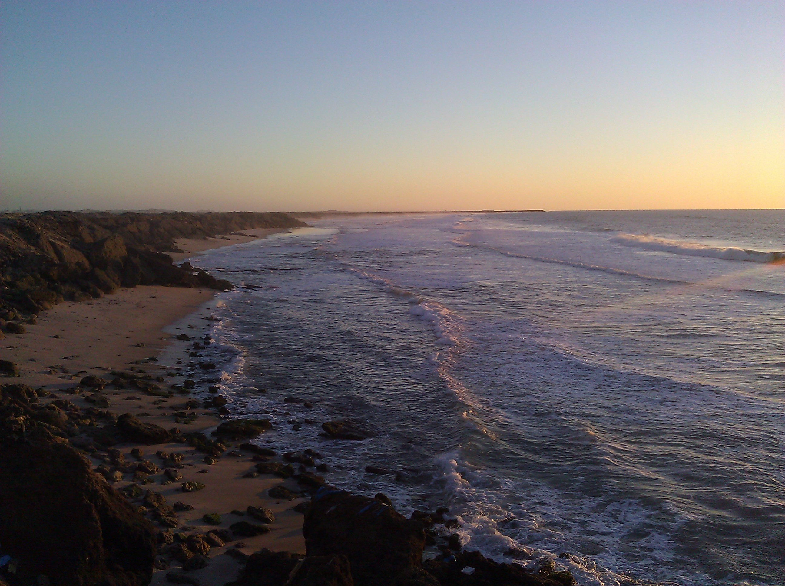 Dakhla, Western Sahara